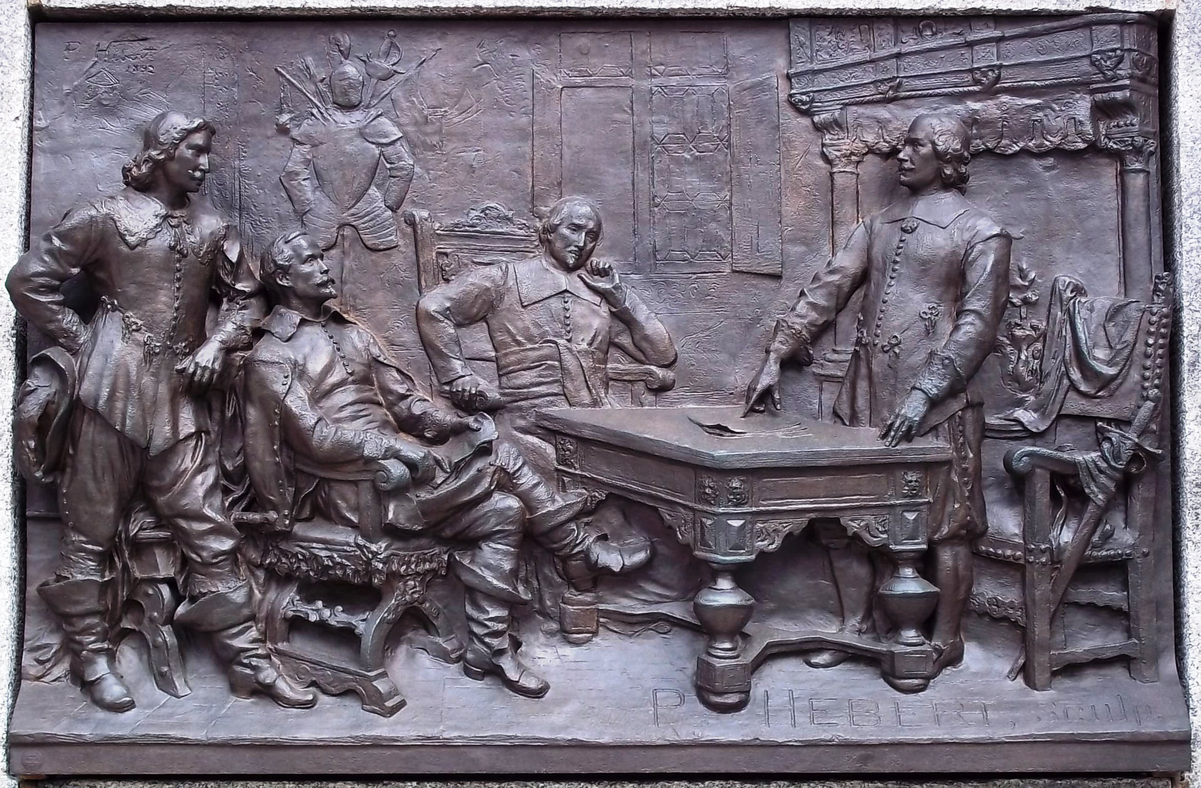 Bas-relief de Louis-Philippe Hébert, Monument à Maisonneuve, Place d'Armes, Montréal.